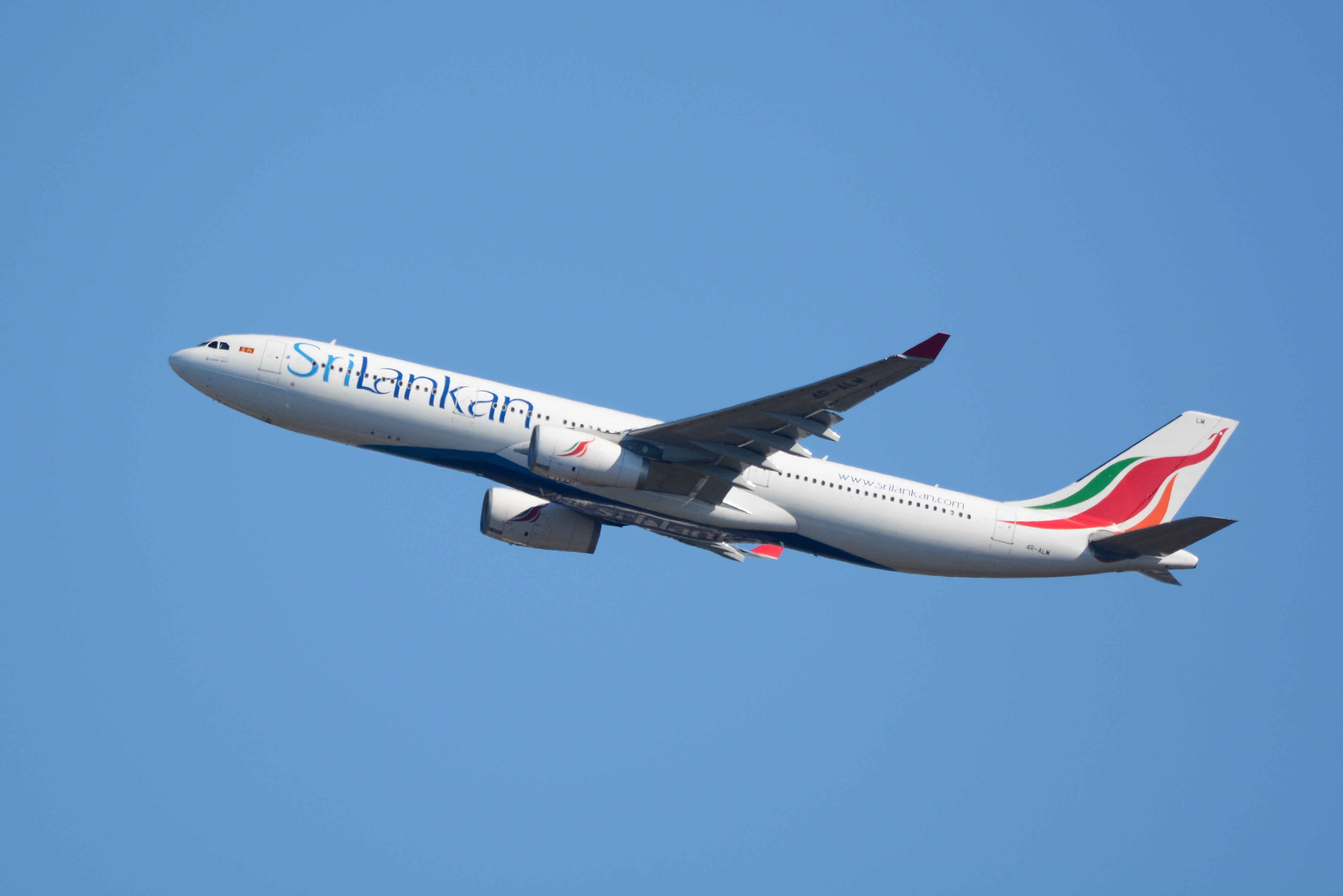 Srilankan Airlines, Airbus A330-300 4R-ALM NRT